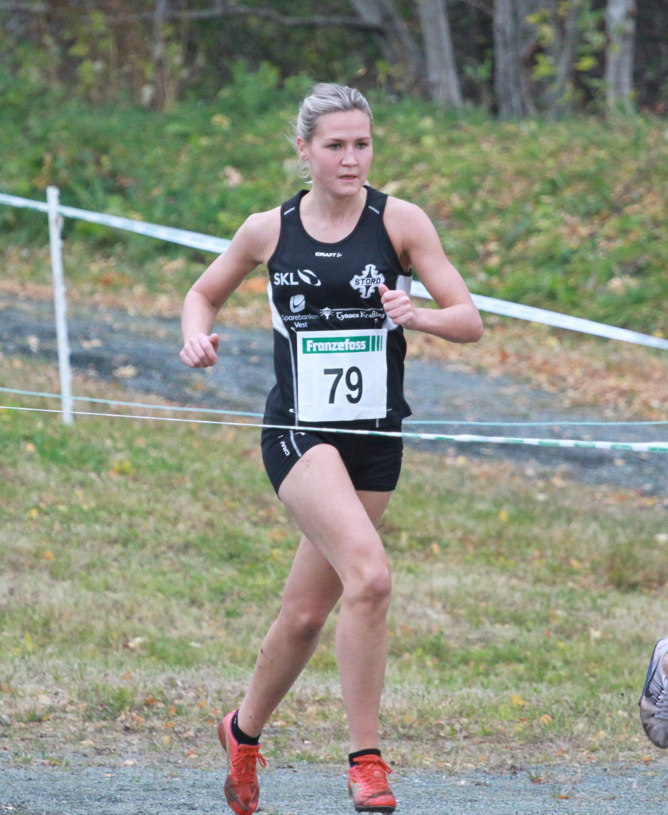 Pernille Eugenie Epland under NM i terrengløp i 2018.